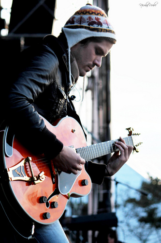 SAMPER EN SOUNDCHECK PARA CONCIERTO NUESTRA TIERRA 2009